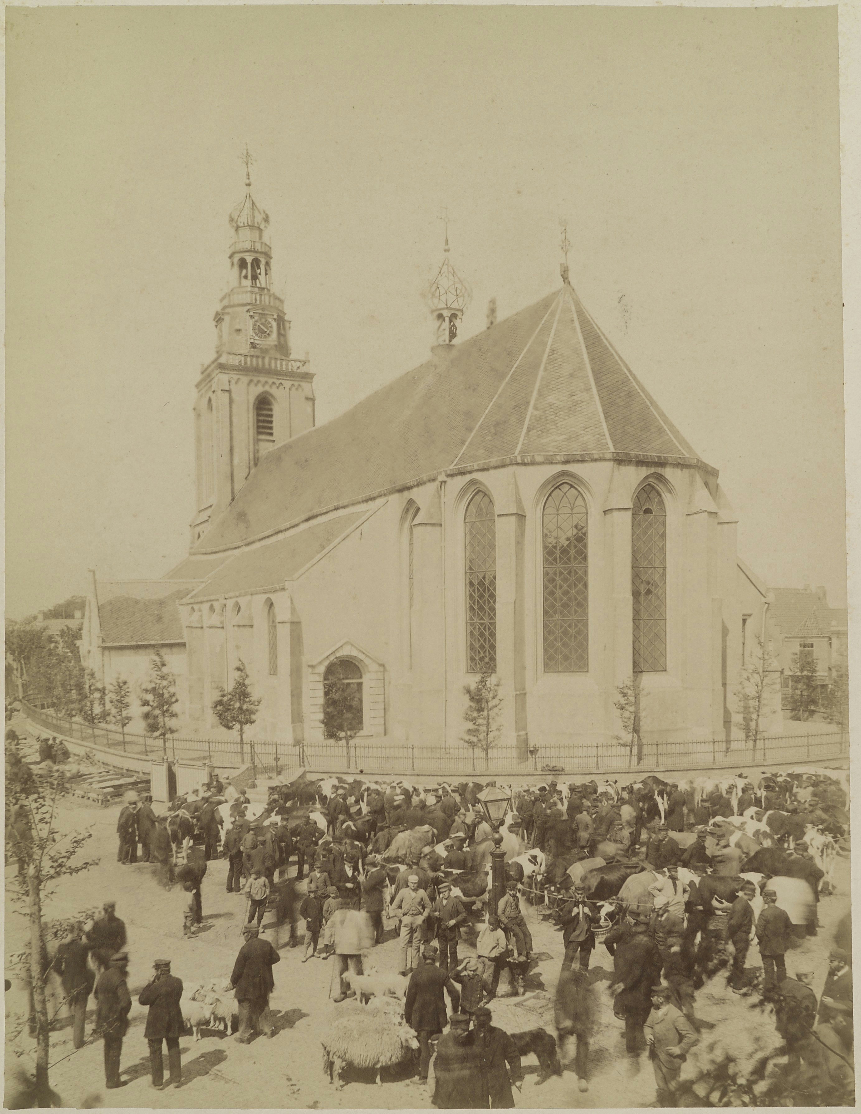 Nederlands Hervormde Kerk: Hervormde kerk vanuit het oosten, met veemarkt op de voorgrond (opmerking: Bureau Mulder)